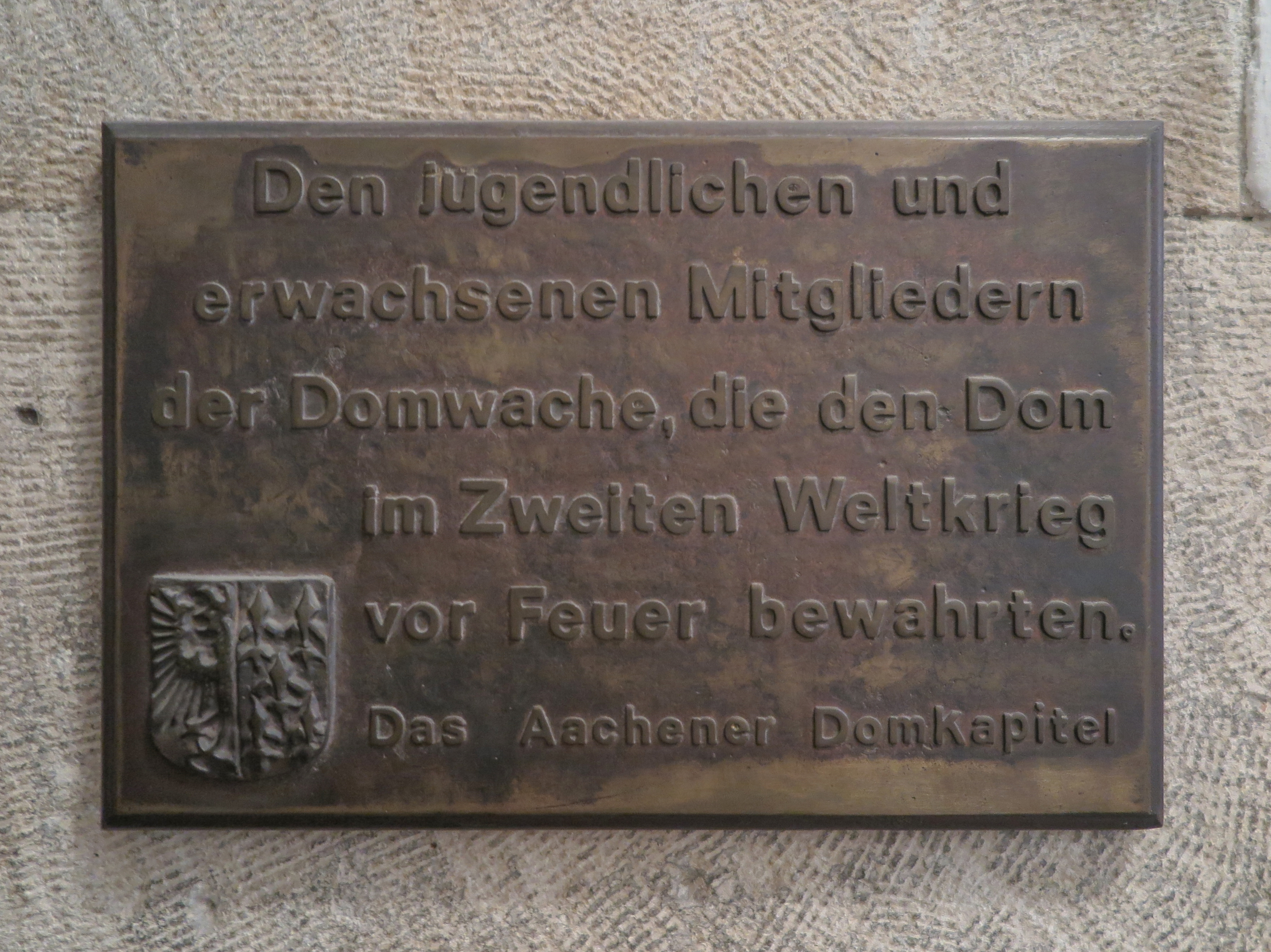 Gedenktafel im Aufgang zum Hochmünster an die Domwache während des Zweiten Weltkriegs im Aachener Dom.